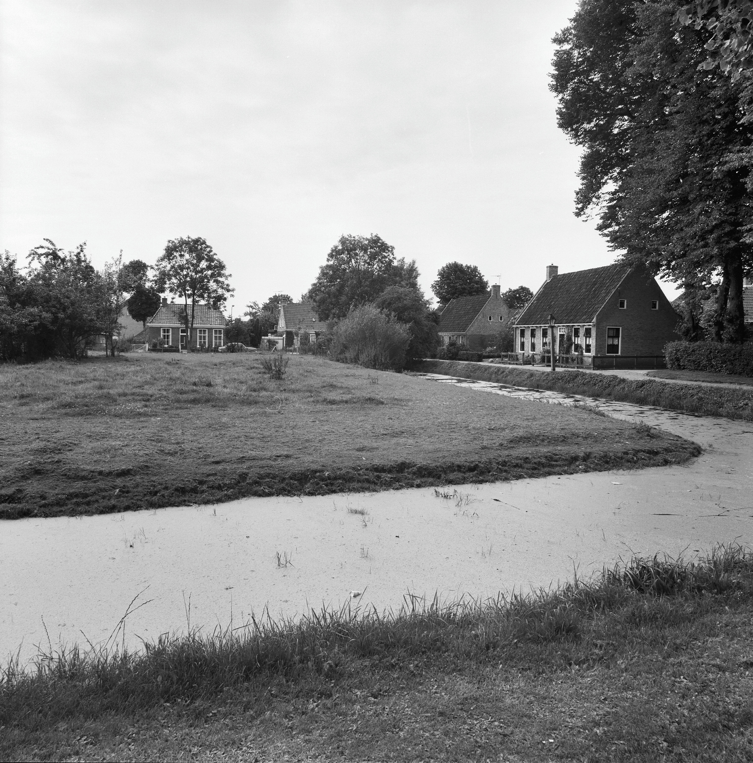 Overzichten: Tsjerkebuorren (Zuid) Stateterrein